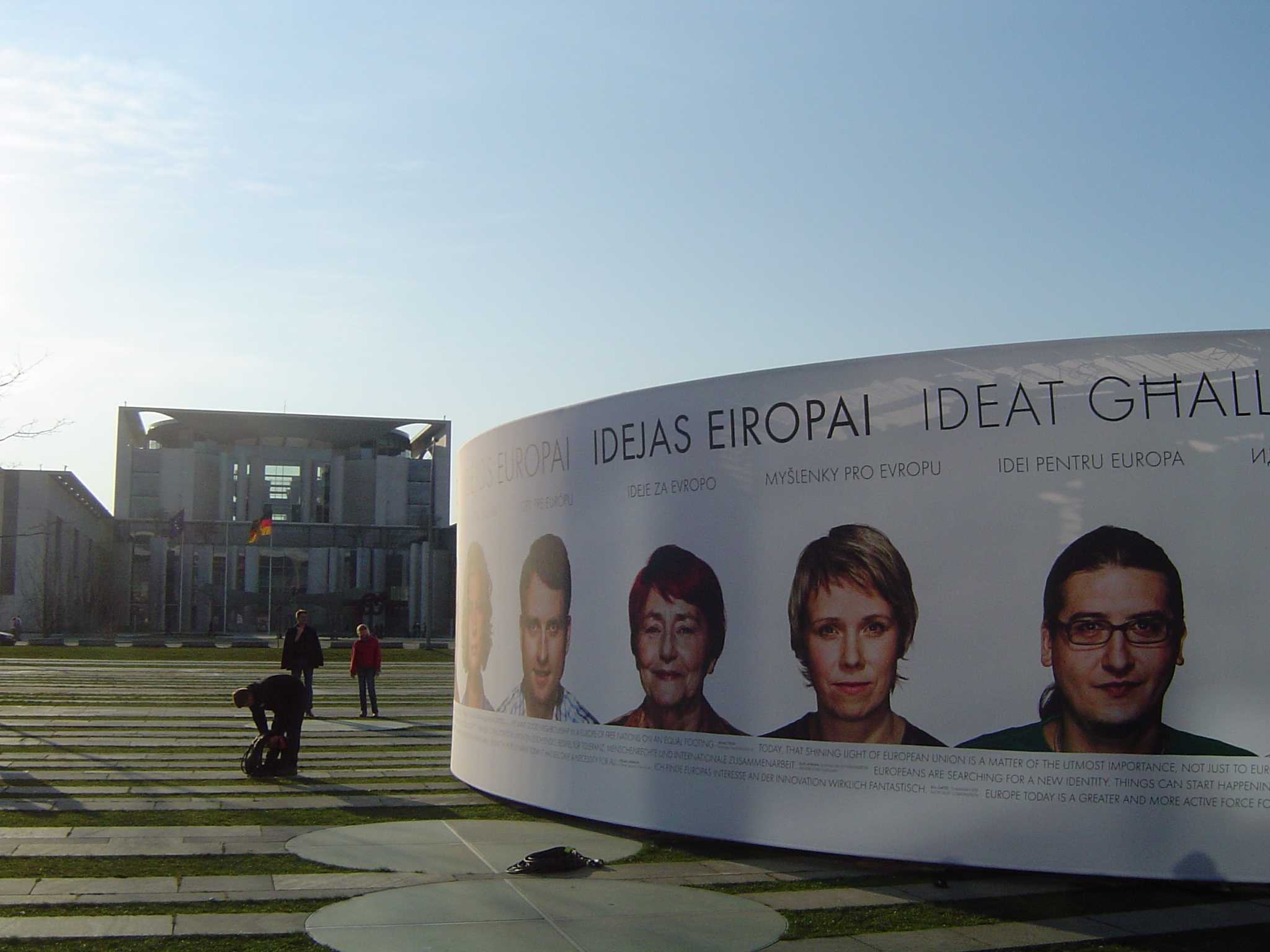 Installationen Idéer for Europa, lavet i anledning af Rom-traktatens jubilæum.